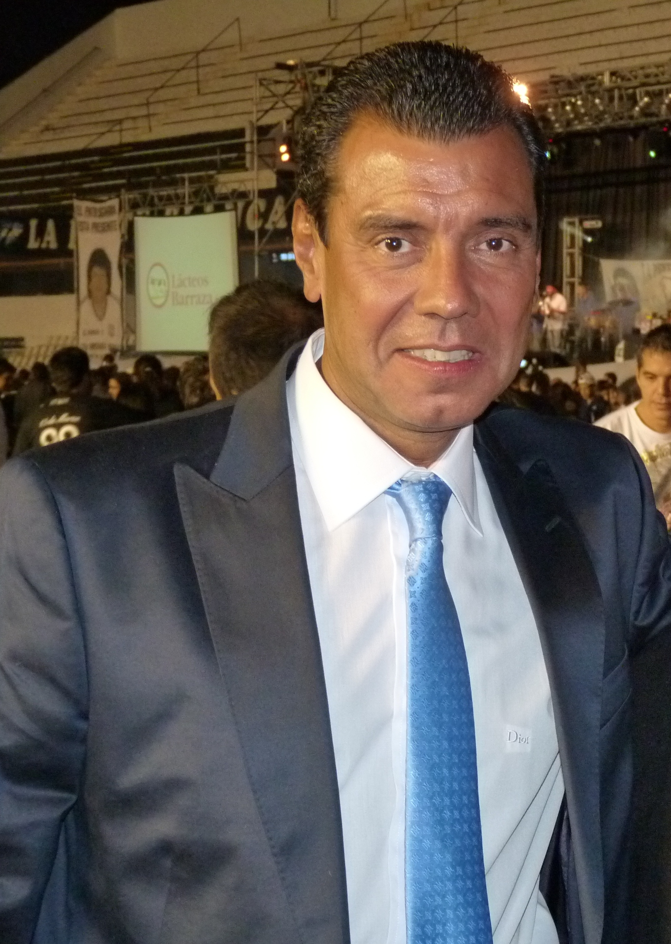 Imagen del presidente de all boys